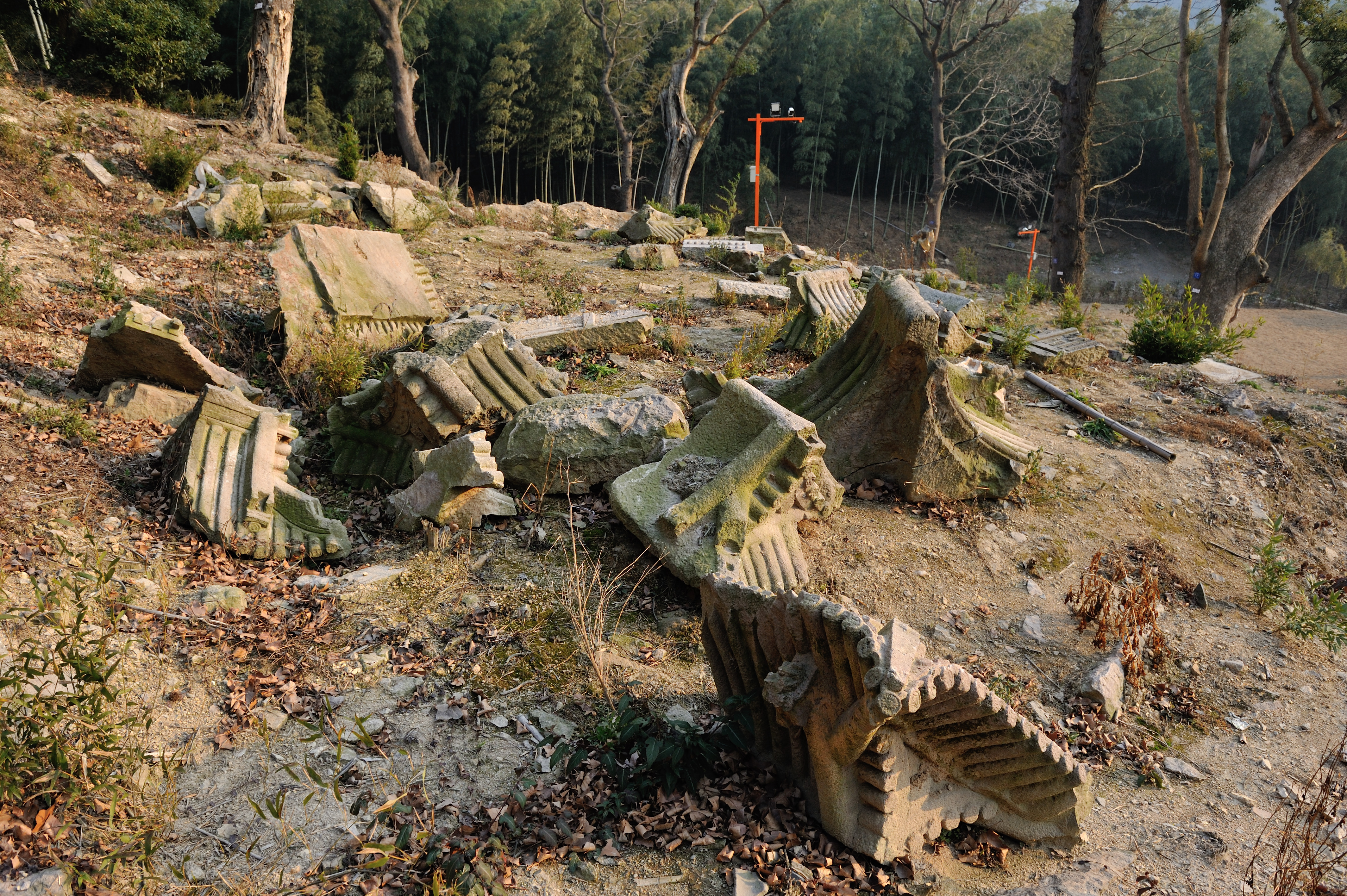 大慈山史弥远墓道